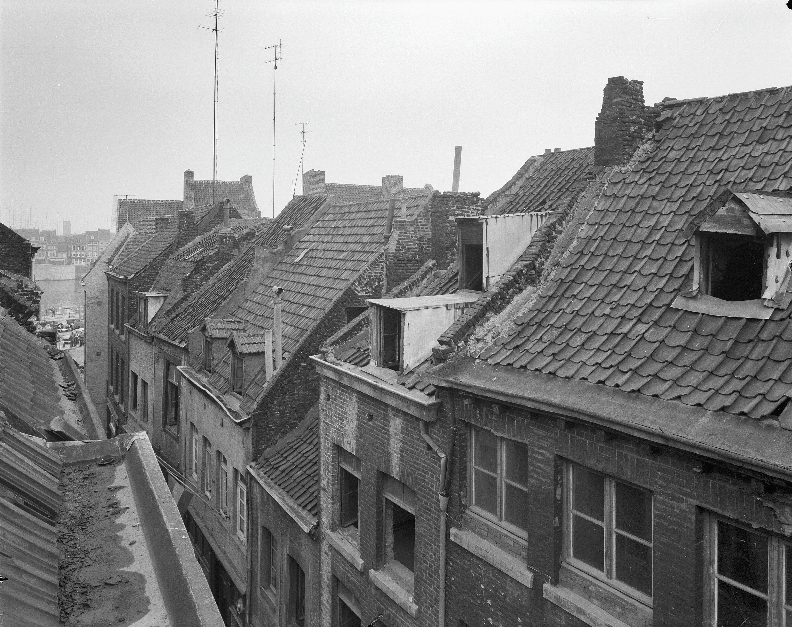 overzicht van de daken